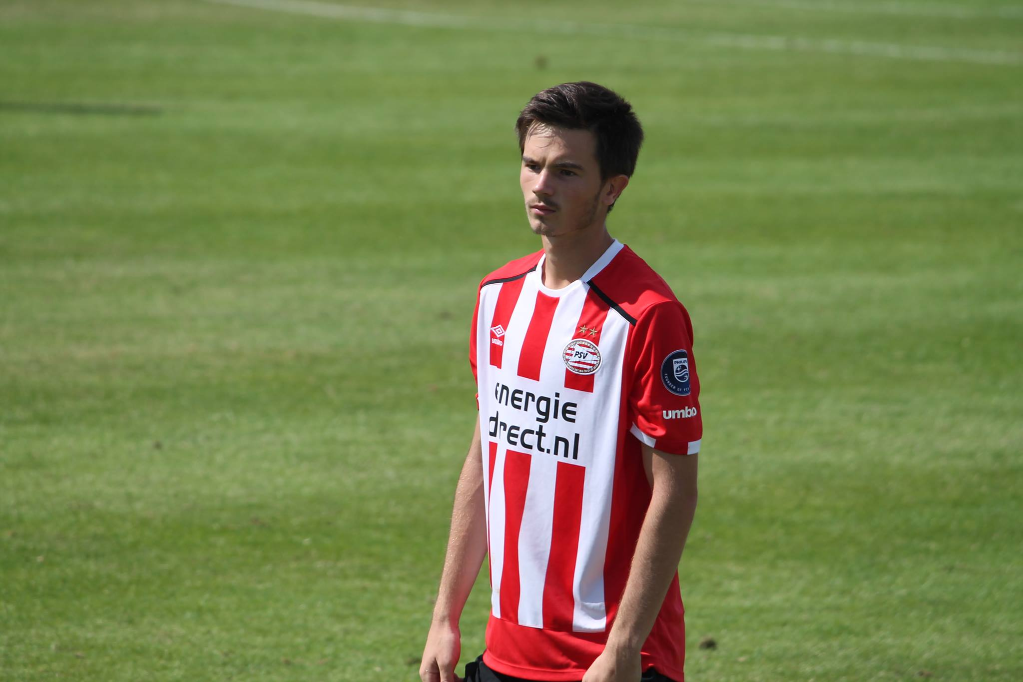 Kun Bertalan PSV-mezben